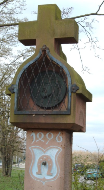 Wappen in Brühl